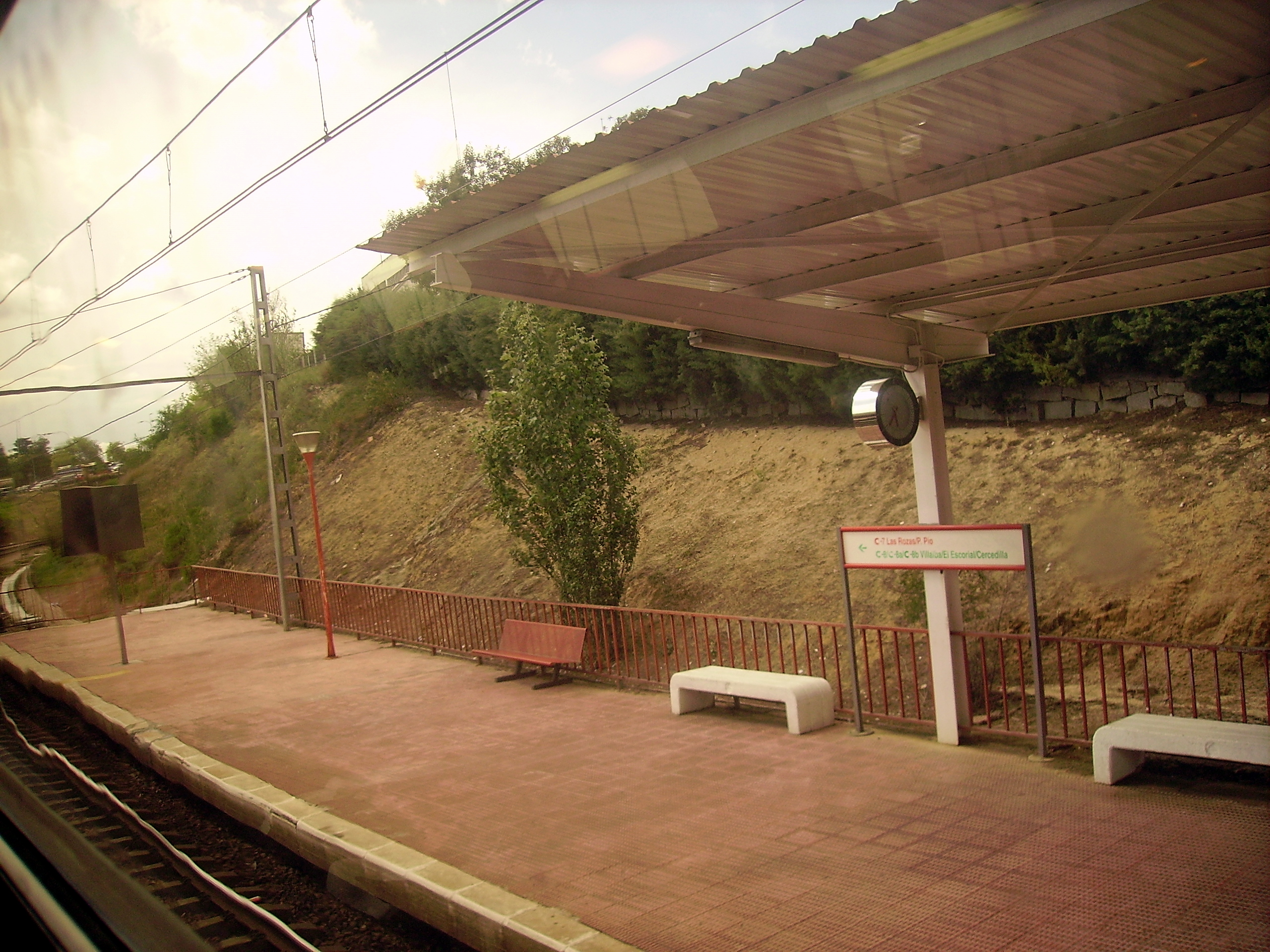 Andén de la estación